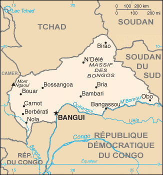 Carte de la République centrafricaine Source : CIA World Factbook ; D'après un chargement de Utilisateur:Rinaldum.